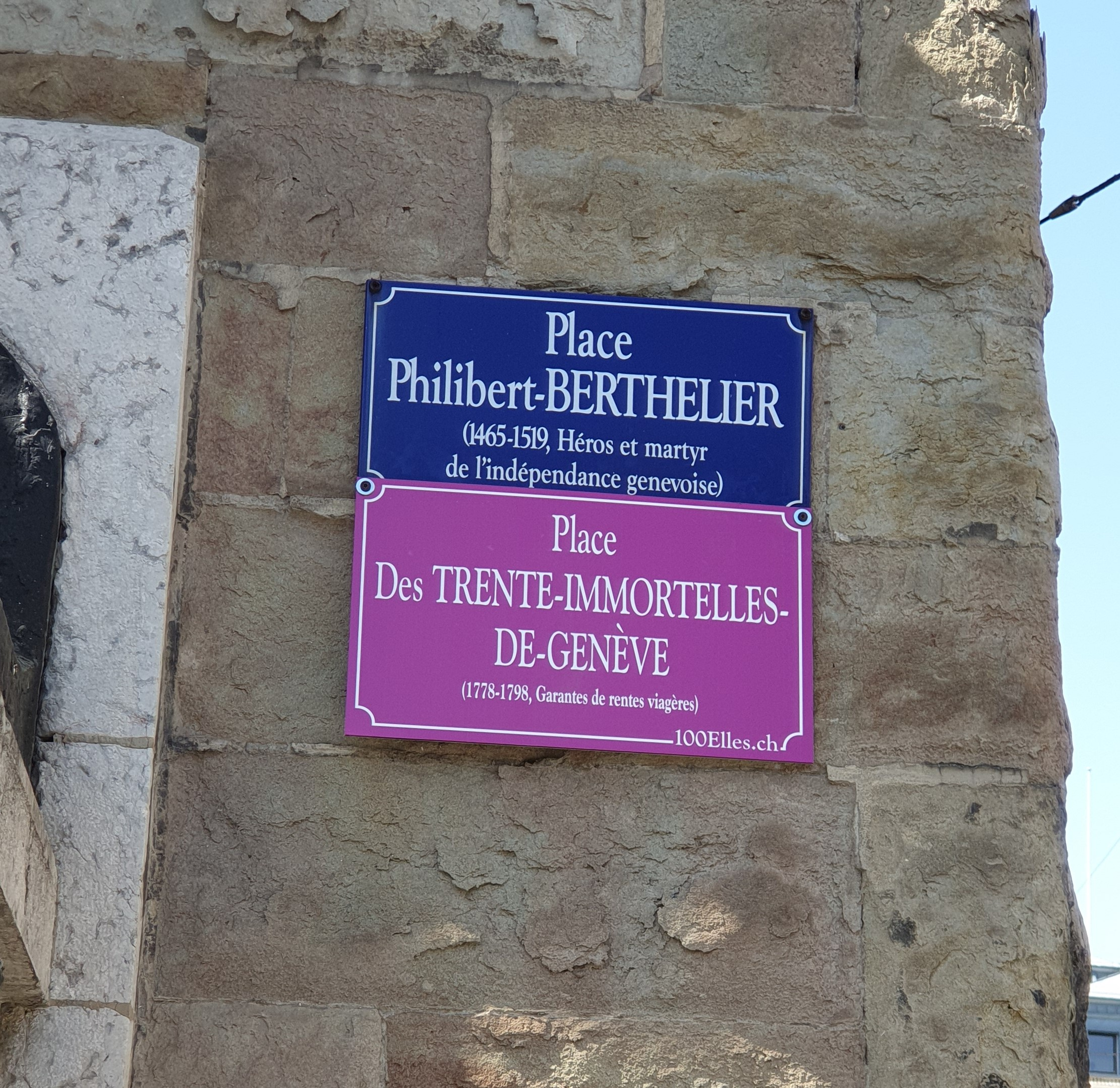 Plaque temporaire de rue apposée dans le cadre du projet 100elles à Genève en 2019